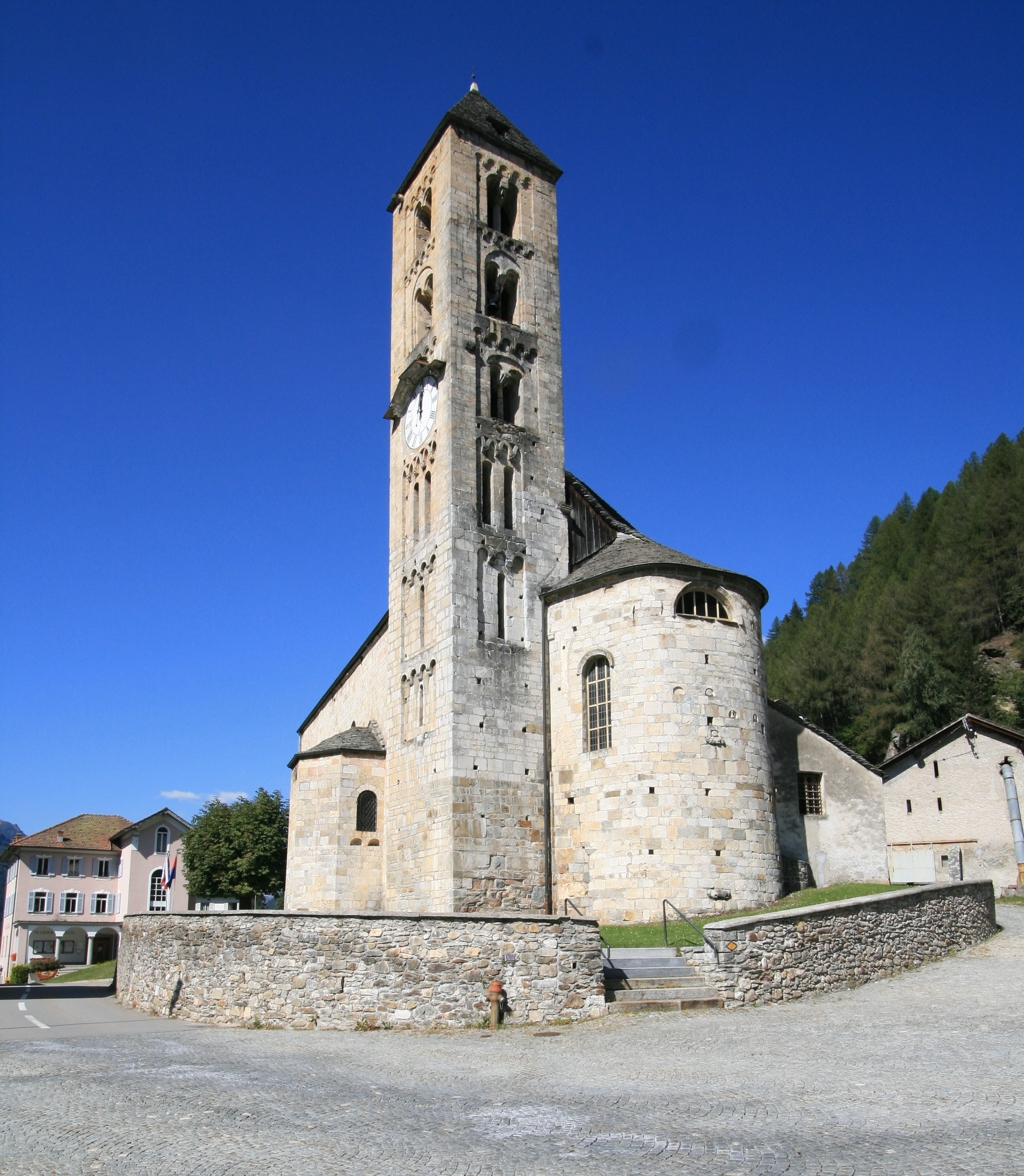 Quinto, Kirche